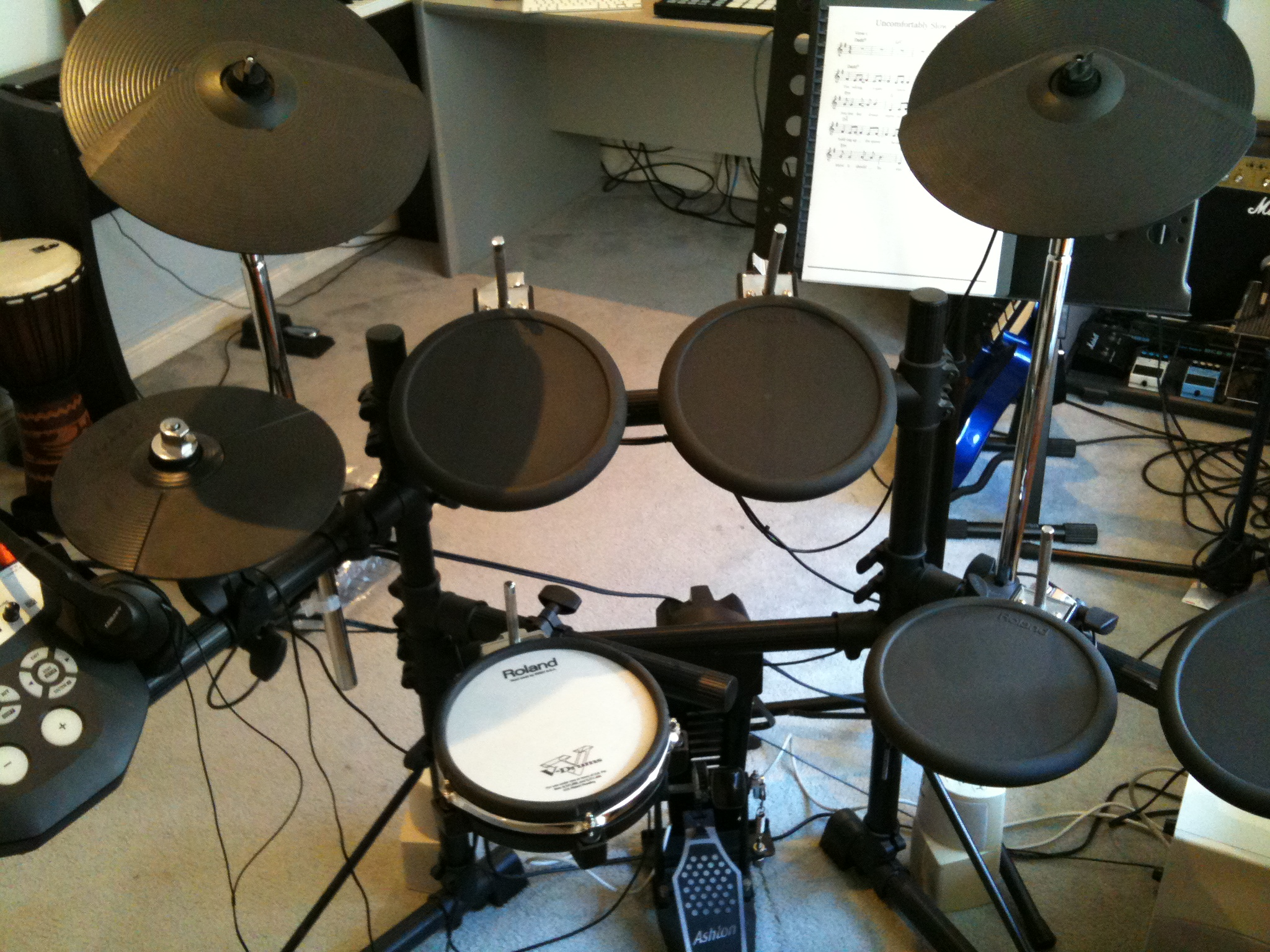 V-Drums